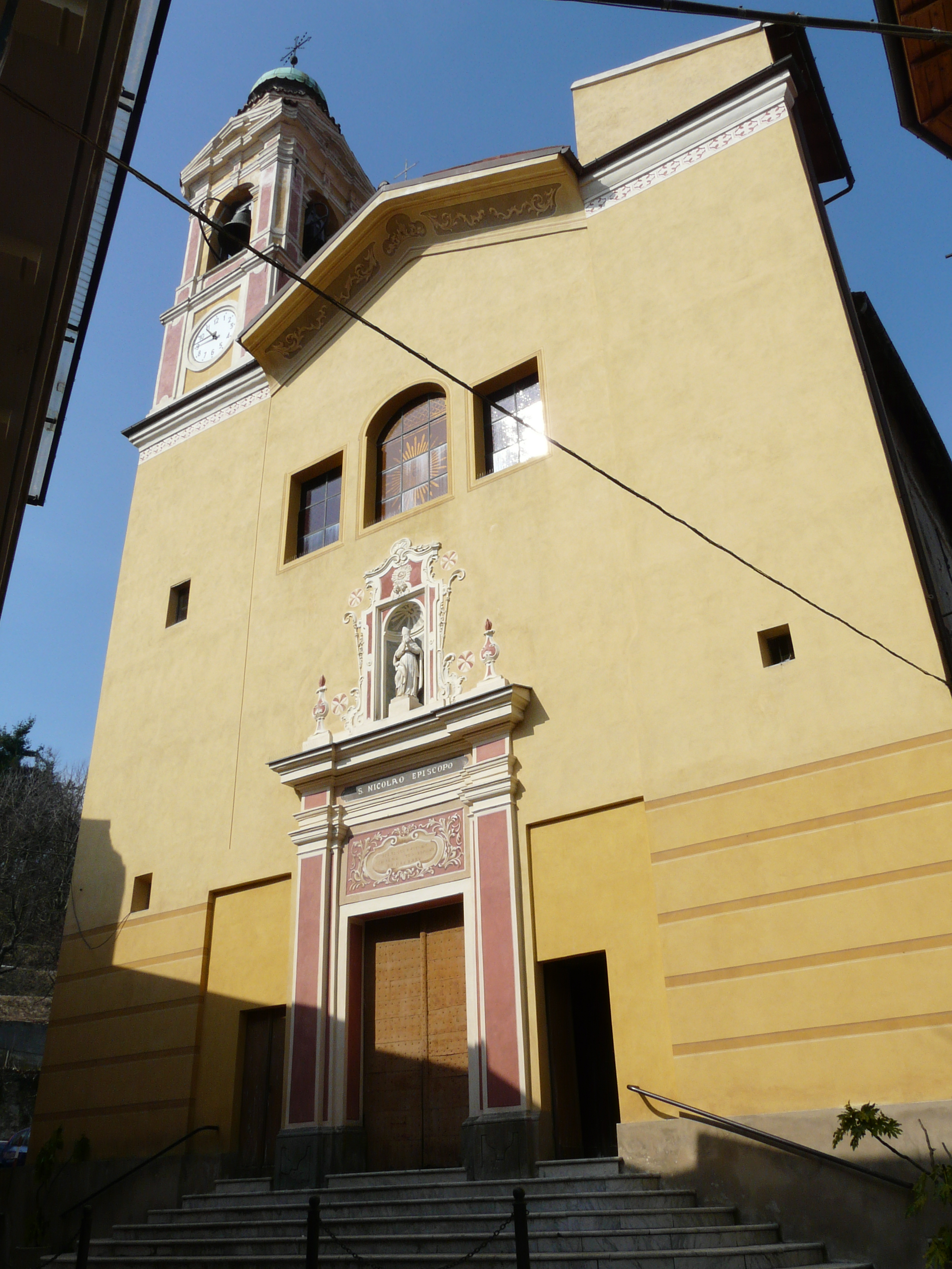 Chiesa di San Nicola, Mallare, Liguria, Italia